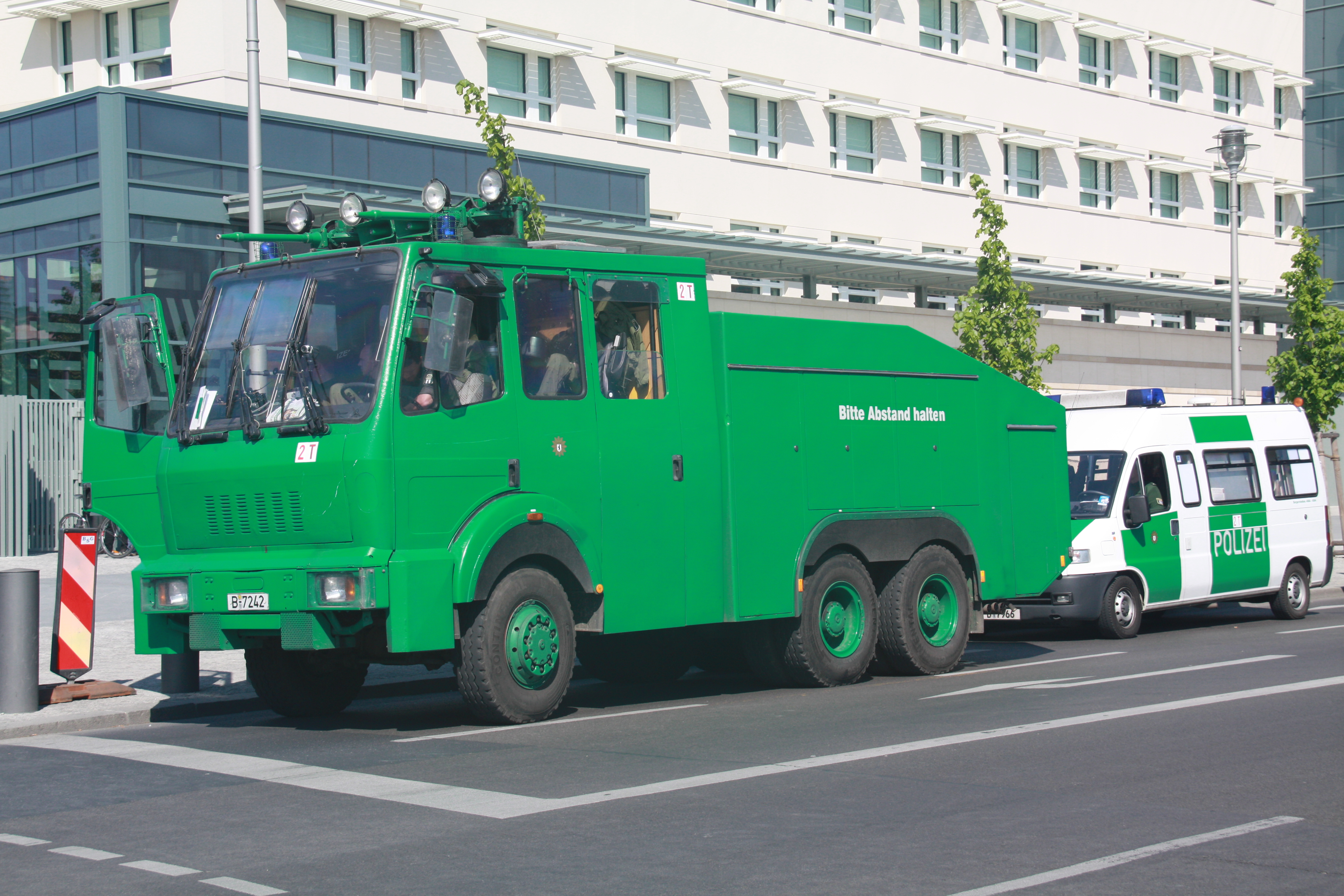 Duitse politie